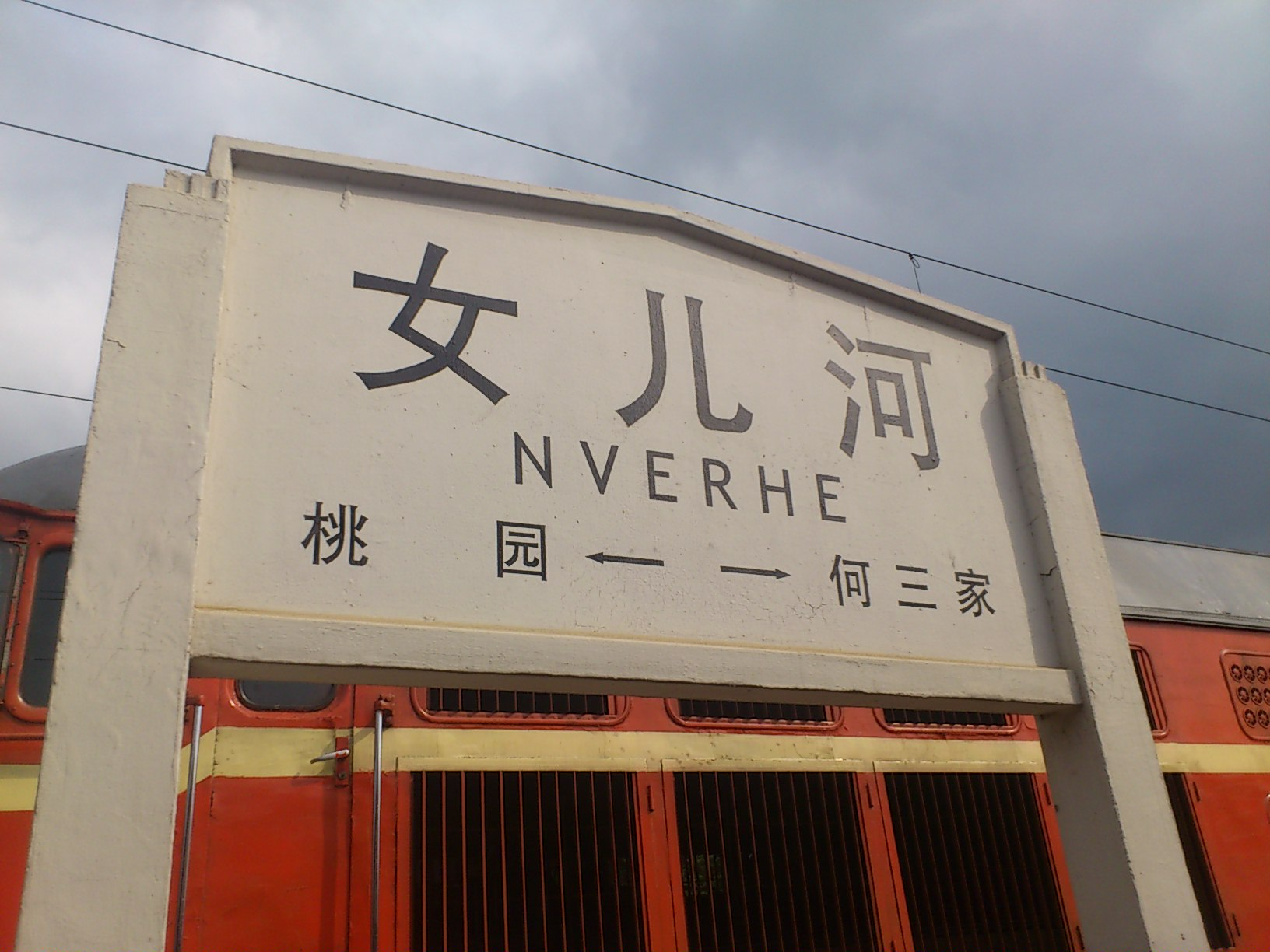 女儿河站站牌